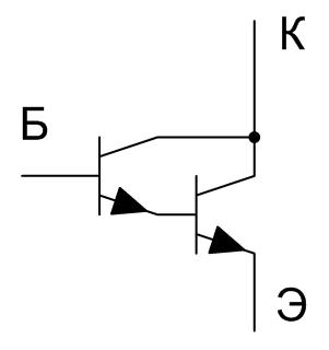 Схематичное изображение составного n-p-n транзистора